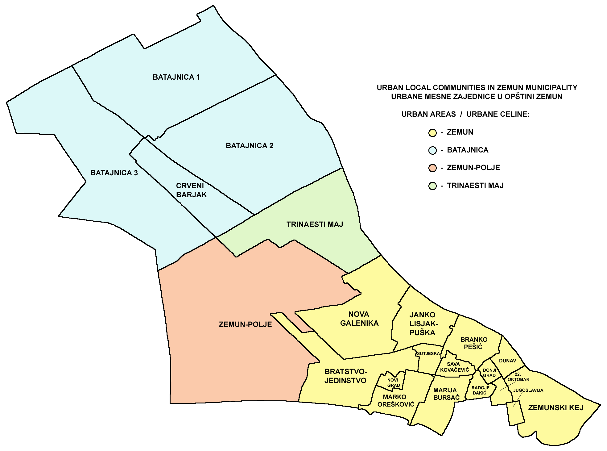 Urban local communities in Zemun municipality. Urbane mesne zajednice u opštini Zemun.